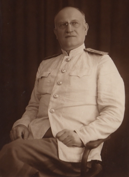 Михаил Васильевич Винокуров (1890-1955) - учёный в области железнодорожного транспорта, генерал-директор тяги II ранга, доктор технических наук, профессор.